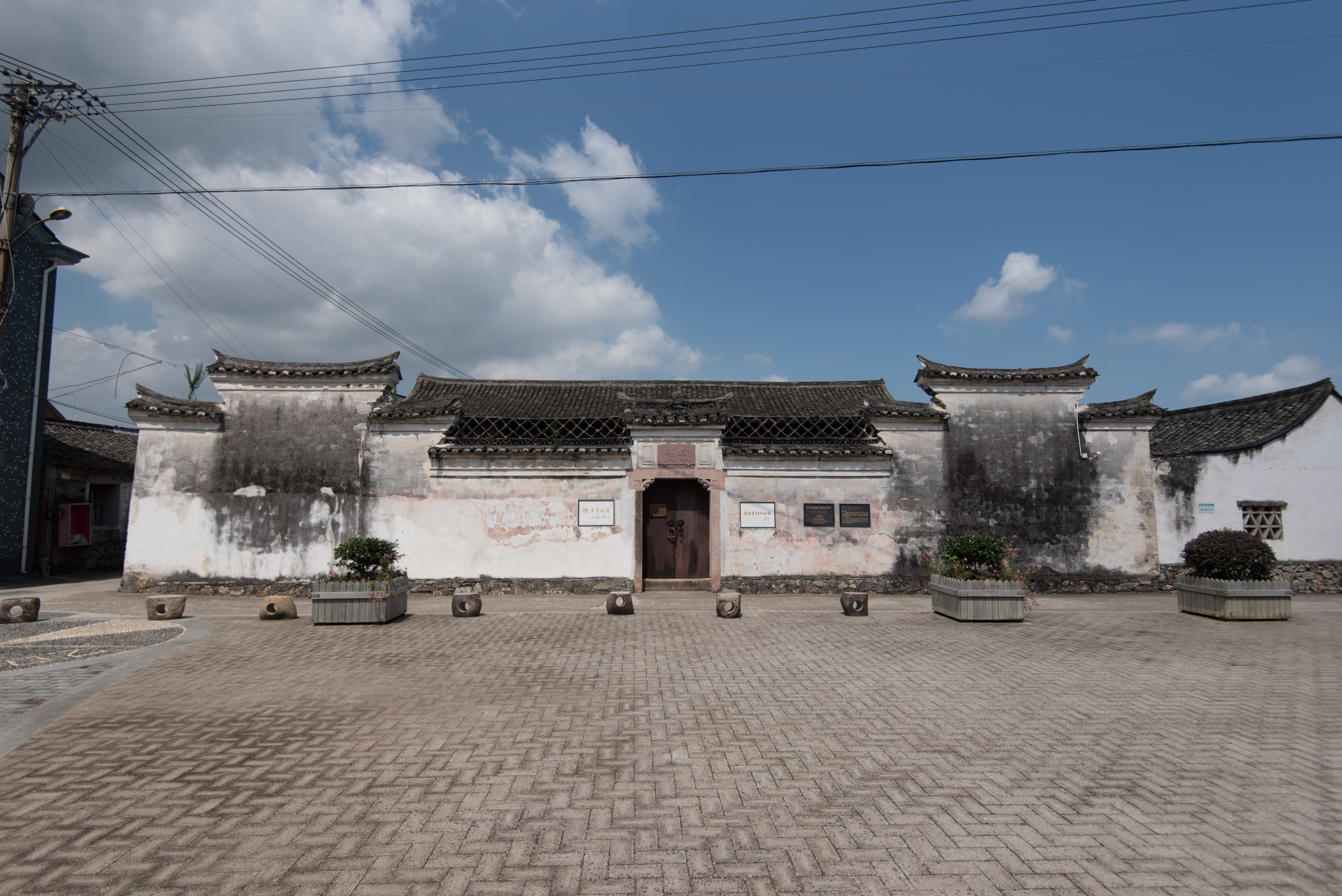 象山陈汉章故居